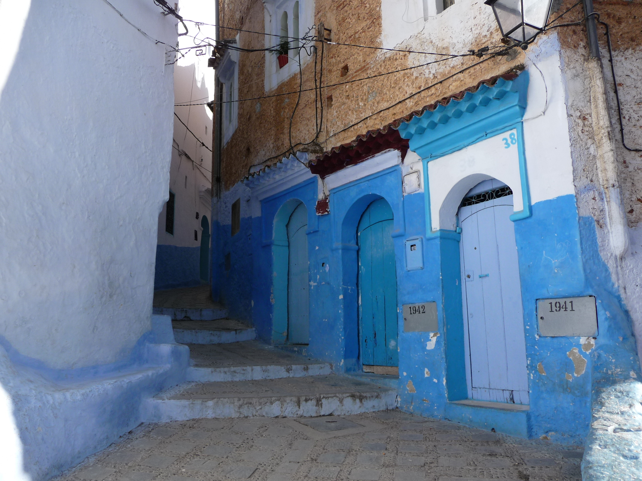 Shagen-P1050680.JPG